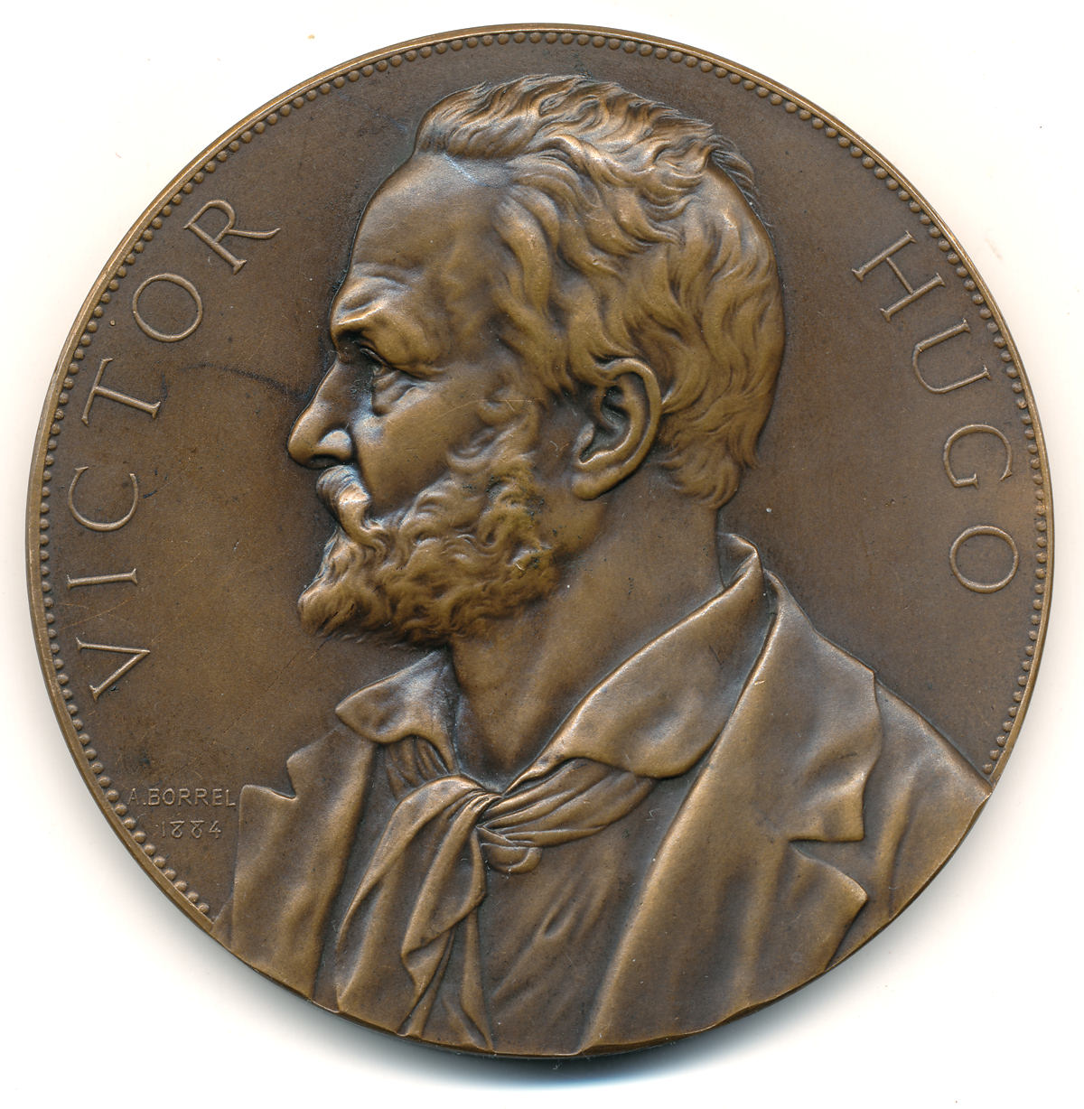 Médaille à l'effigie de Victor Hugo, œuvre de A. Borrel, 1884, Bronze, 68mm